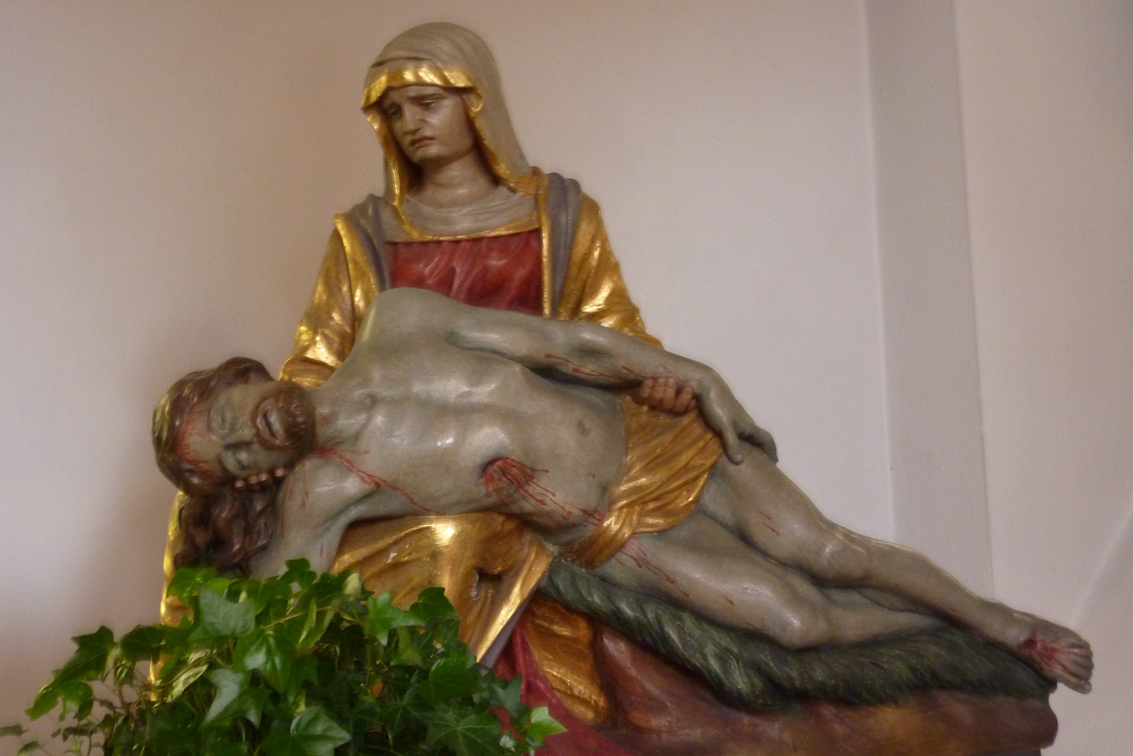 Katholische Pfarrkirche St. Martin in Hillesheim, Pieta von 1662